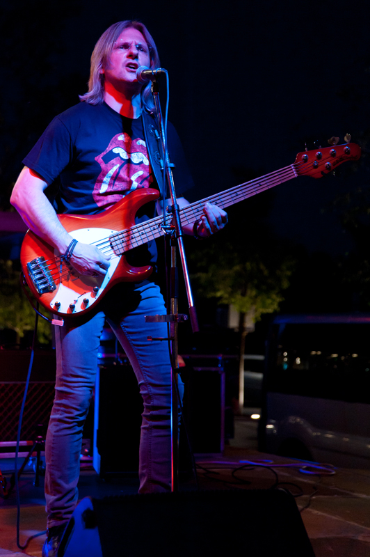 Aerodrom Tomislav Šojat